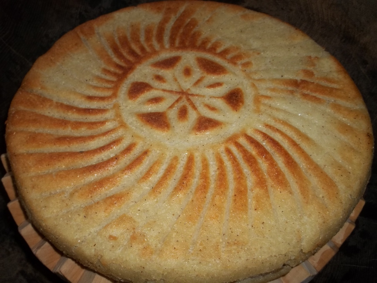 Мчади рачули с ветчиной